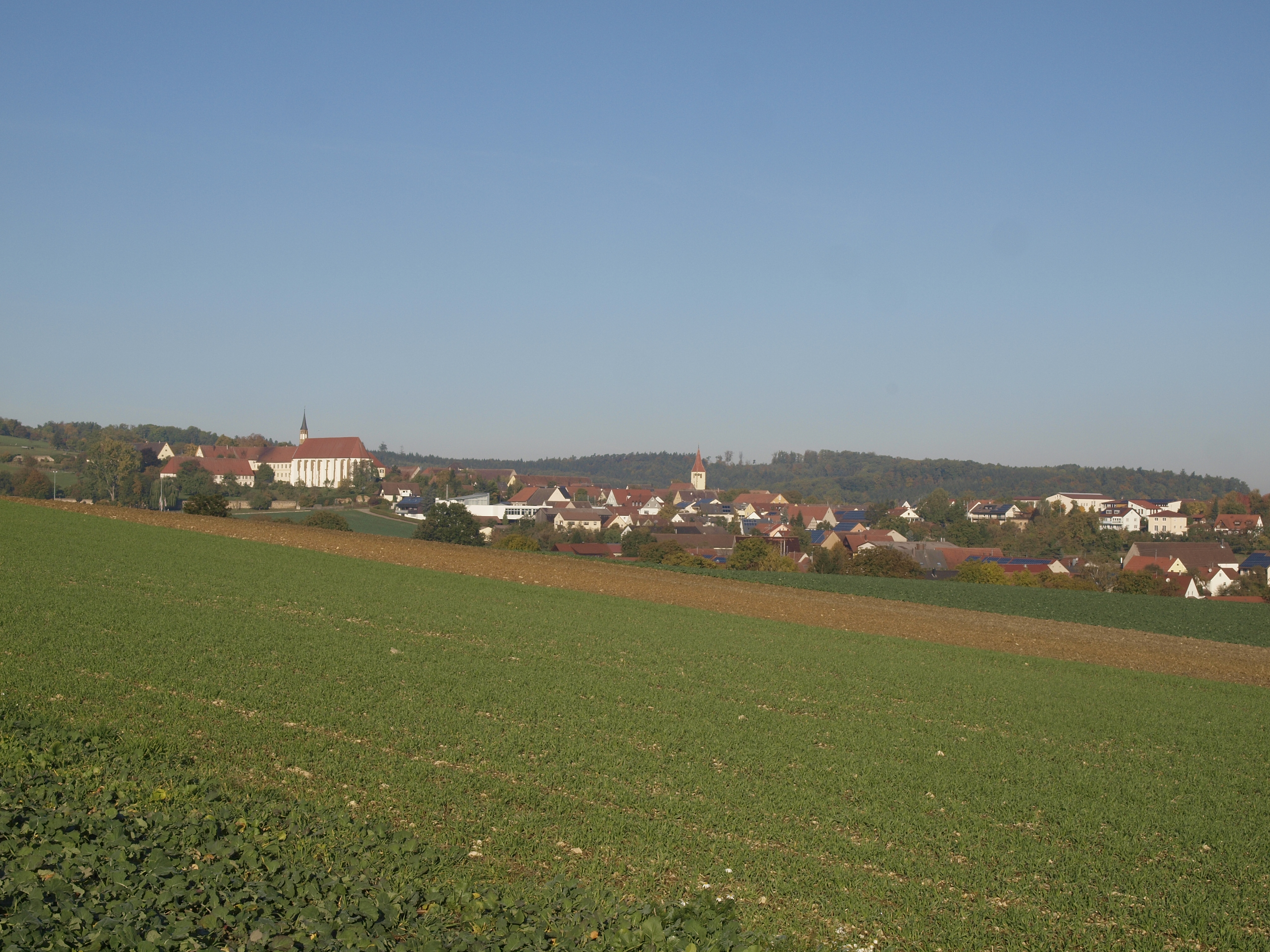 Die Ortschaft Kirchheim am Ries